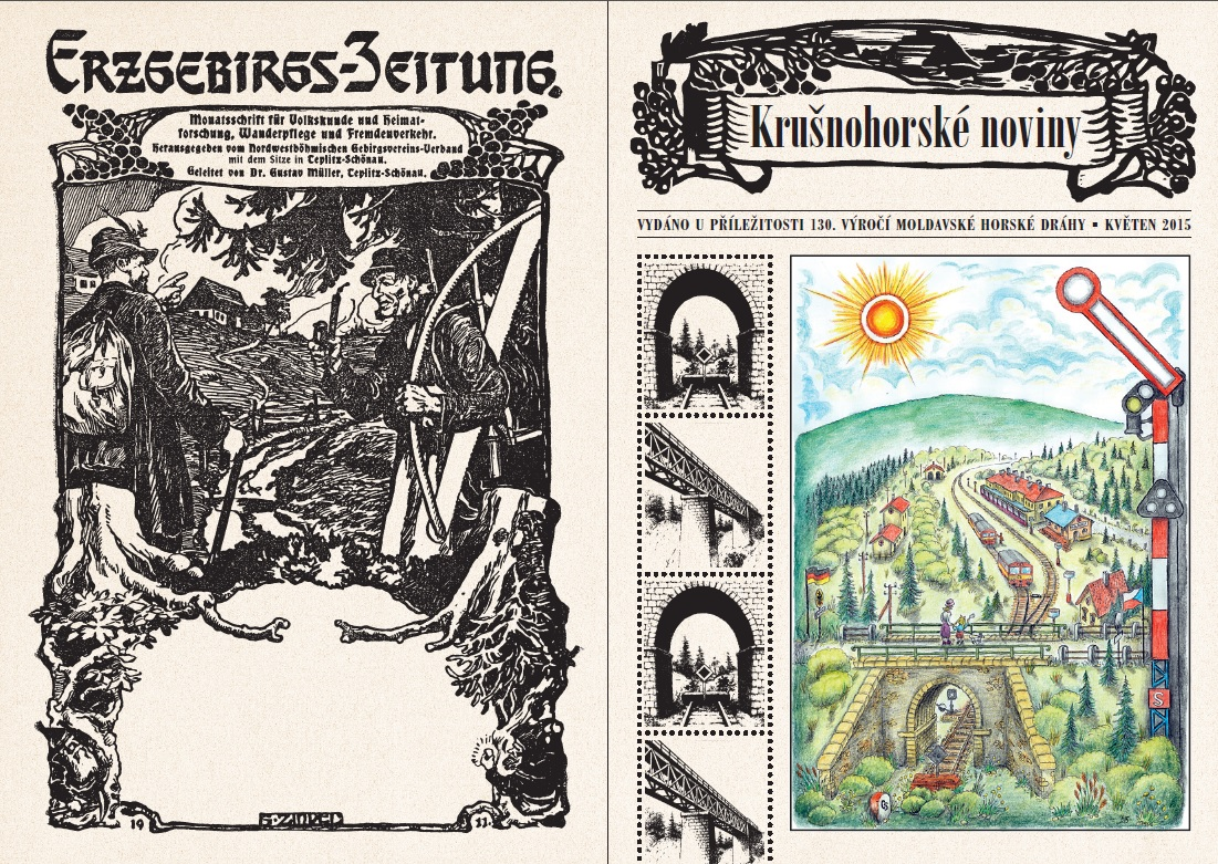 Krušnohorské noviny - titulka stará a nová